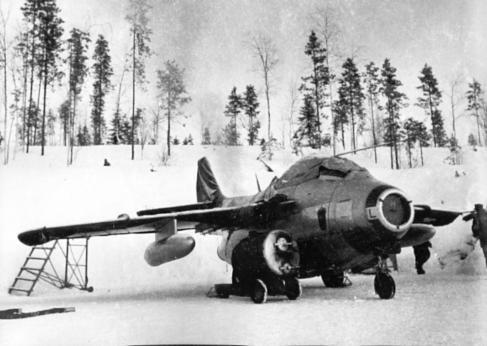 A 29B Tunnan från F6 Karlsborg på Gunnarns flygbas 1957.